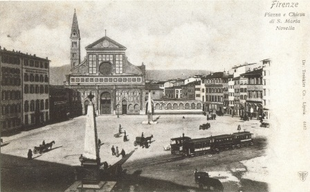 Firenze, SMN con tram